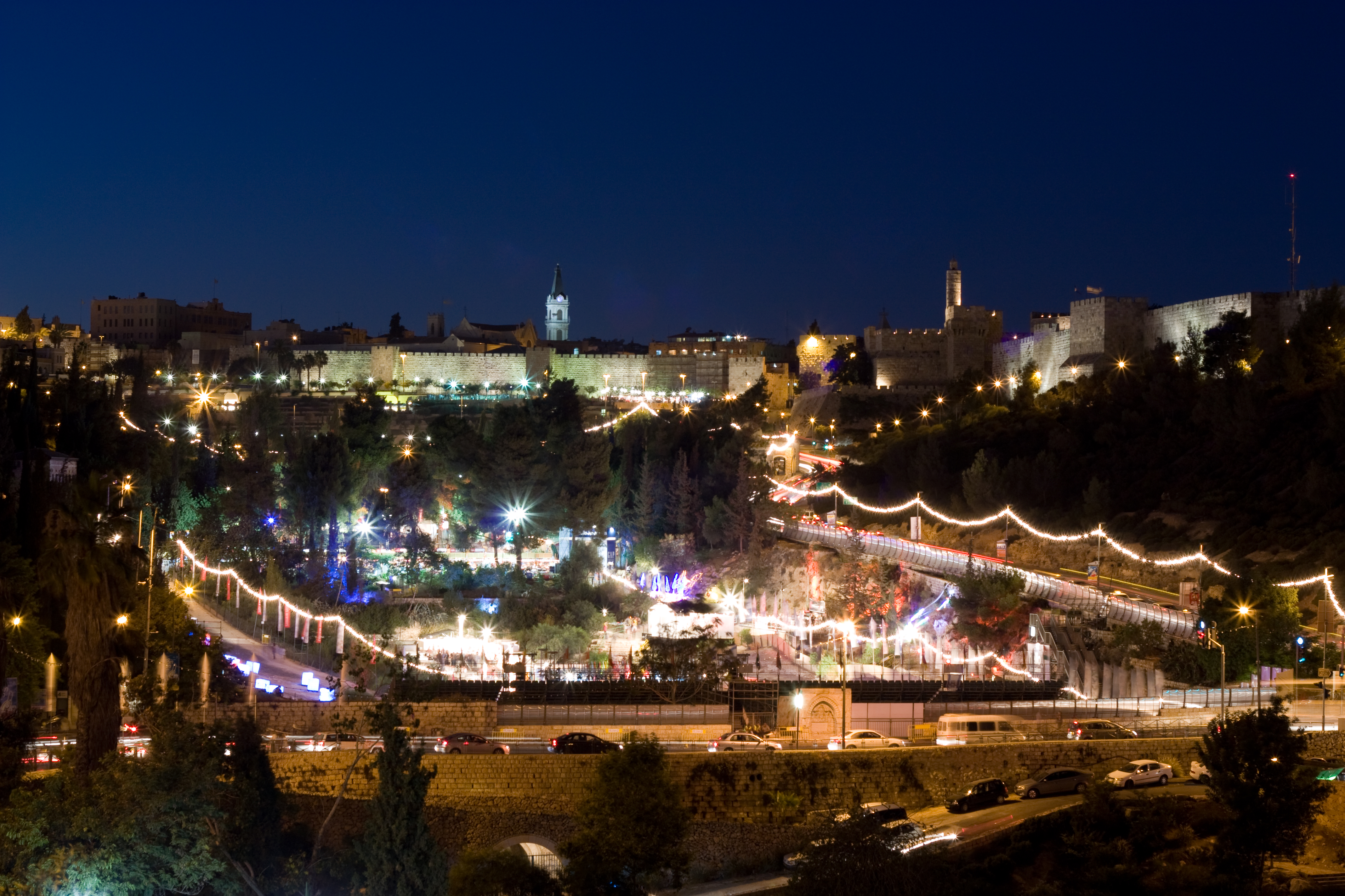 חוצות היוצר